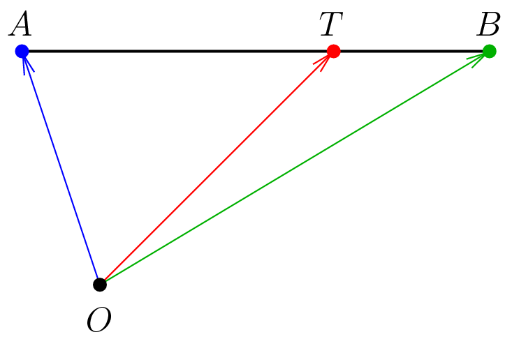 Vektoren zur Berechnung des Teilverhältnisses